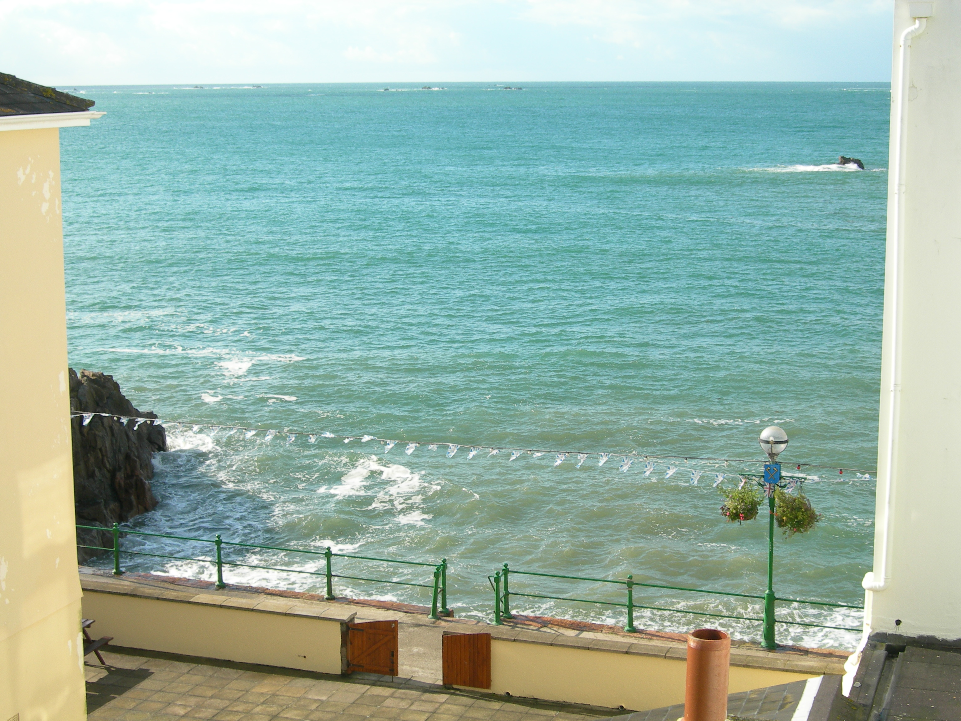 Marée haute au Havre des Pas, Saint-Hélier, Jersey